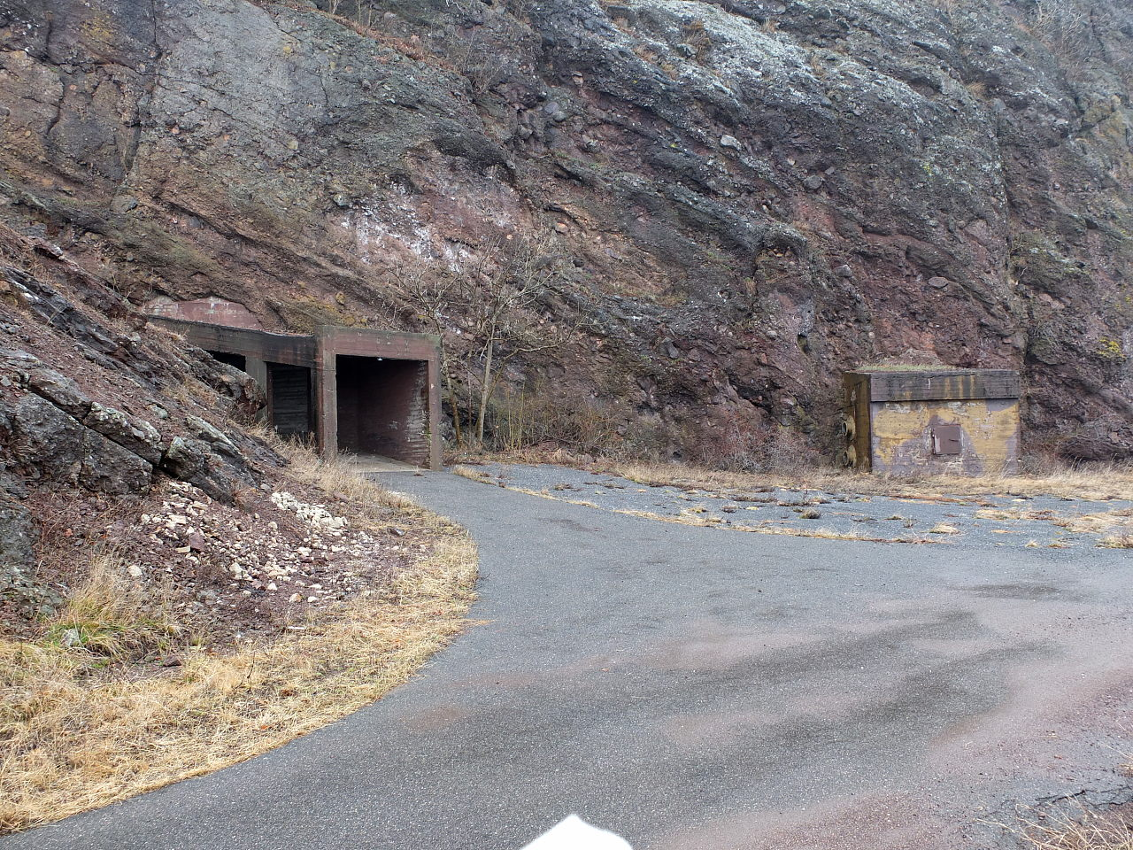 Rauøy fort i Oslofjorden